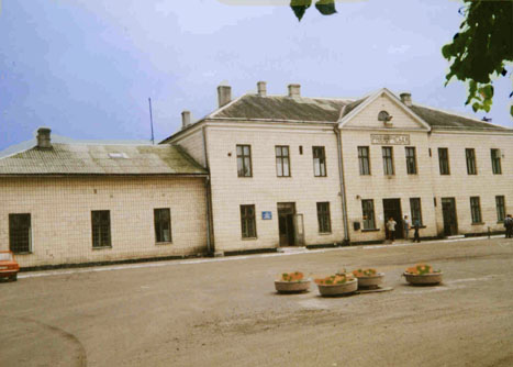 Dworzec kolejowy w Rawie Ruskiej (fot. Jan Tuczyński, 1999)